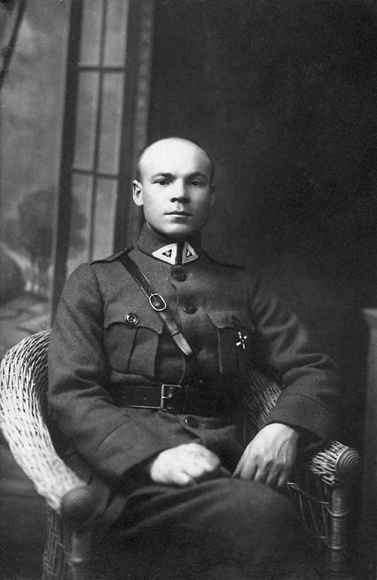 Jonas Asevičius-Acukas (1885 m. Jiezne – 1976 m. Kaune) – Lietuvos kariuomenės pulkininkas, chemikas, docentas.